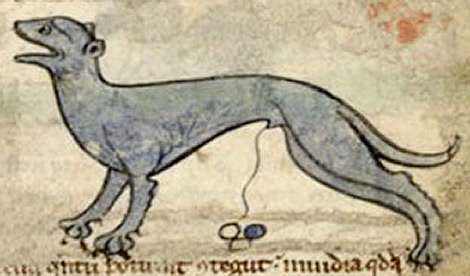 Un lynx dans un bestiaire médiéval du XIIIe siècle. L'urine du lynx se solidifie en une pierre fabuleuse nommée Lynxurius. Document original détenu par la Bibliothèque nationale de France.Unknown